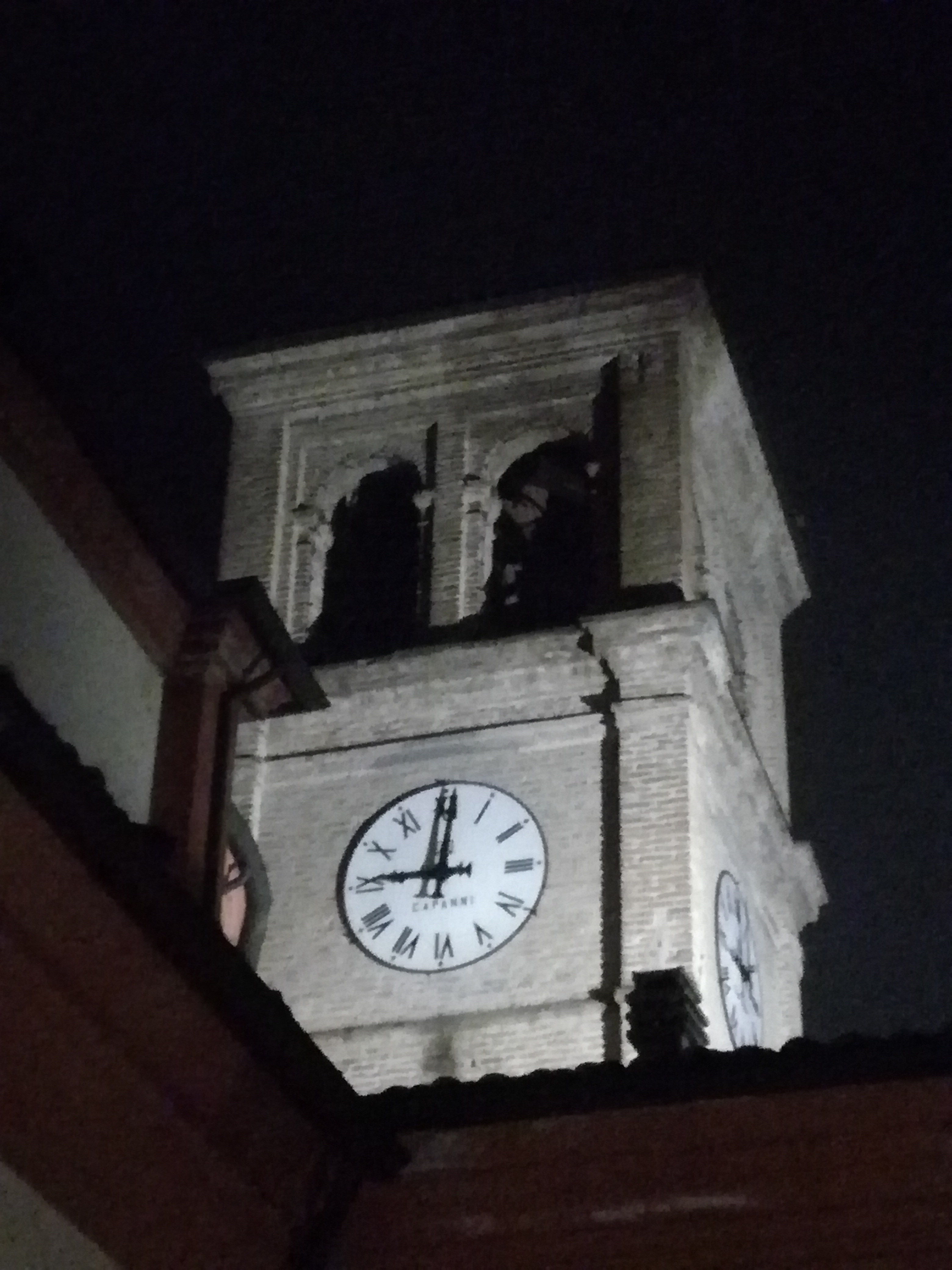 campanile della chiesa di S. Michele Mezzano Superiore